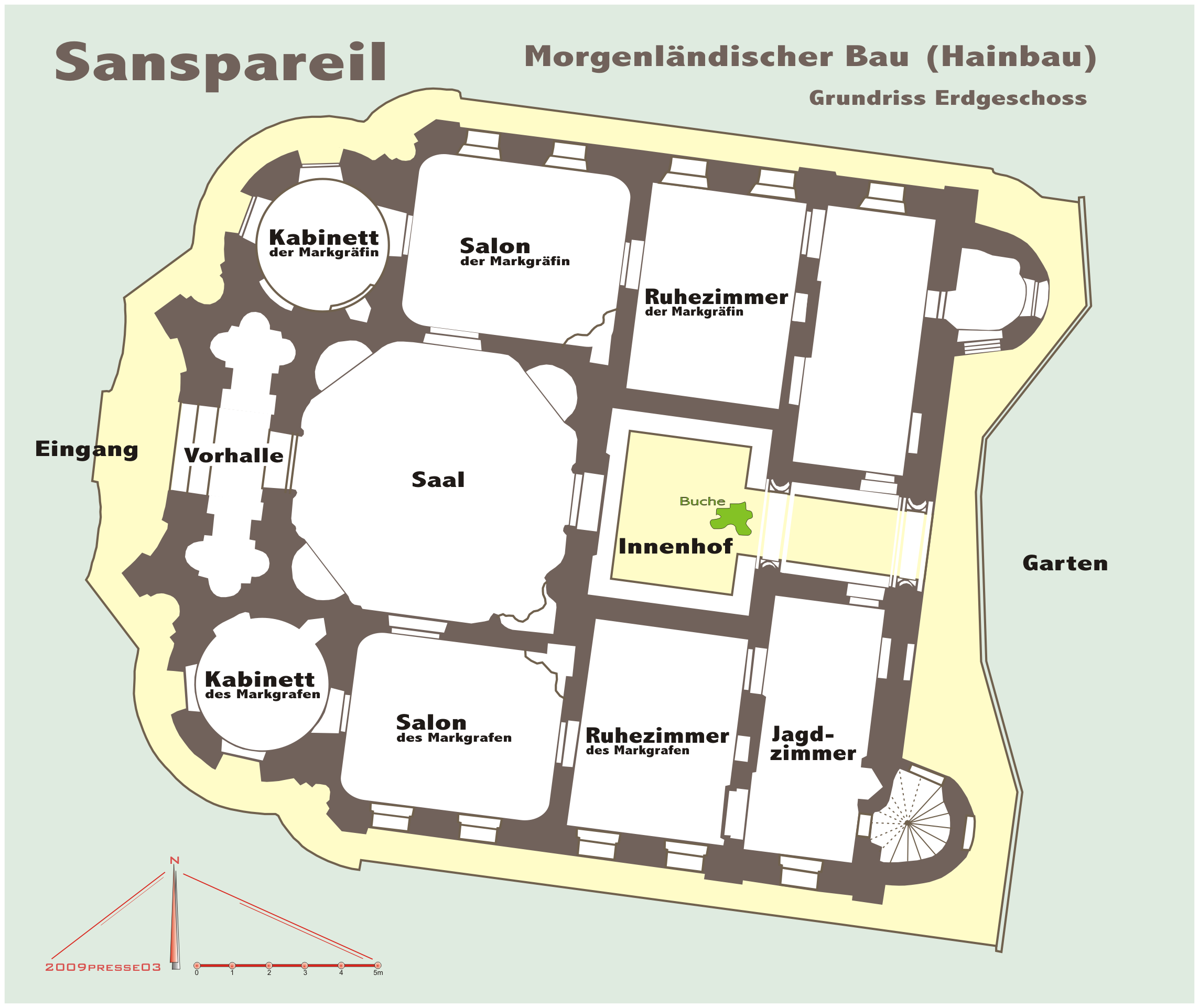 Grundriss Morgenländischer Bau (Hainbau) im Felsengarten Sanspareil, Gemeinde Wonsees, Franken, Bayern